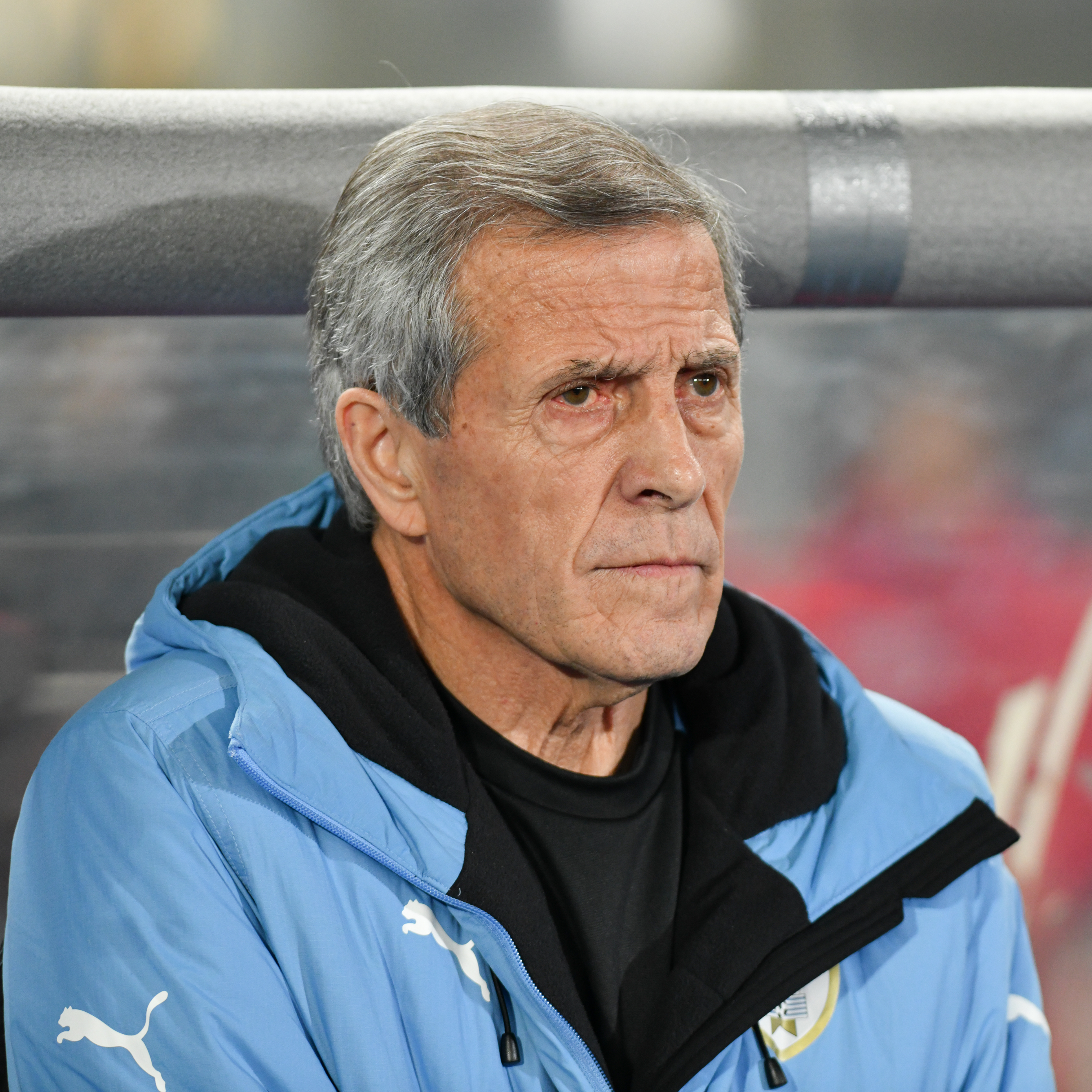 Wien, Österreich, 14.11.2017, Sport, Fussball, OEFB Freundschaftliches Laenderspiel - Österreich vs Uruguay. Bild zeigt Coach Oscar Tabarez (URU).